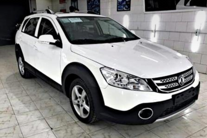 H30 Cross